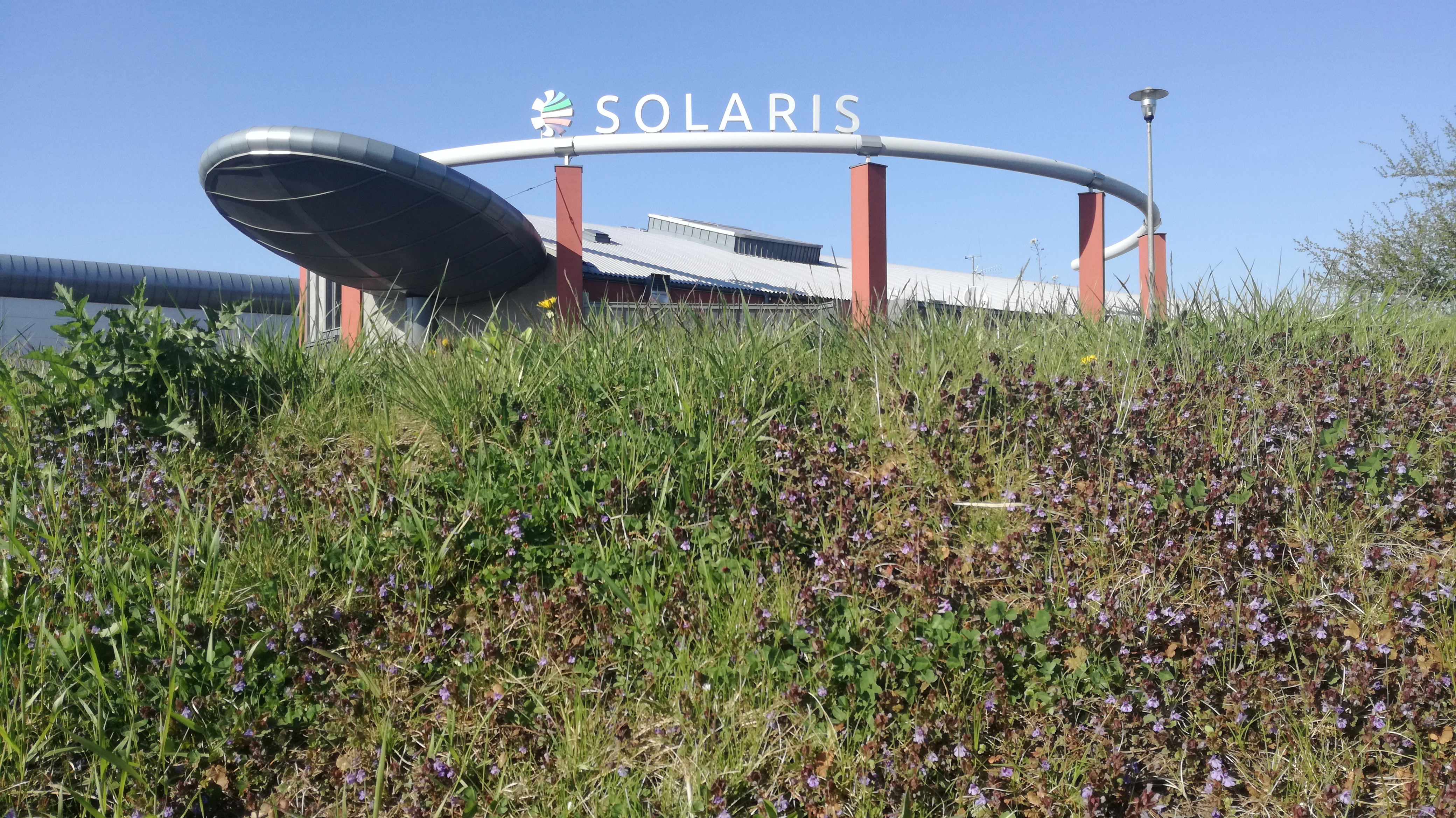 Budynek synchrotronu SOLARIS wiosną